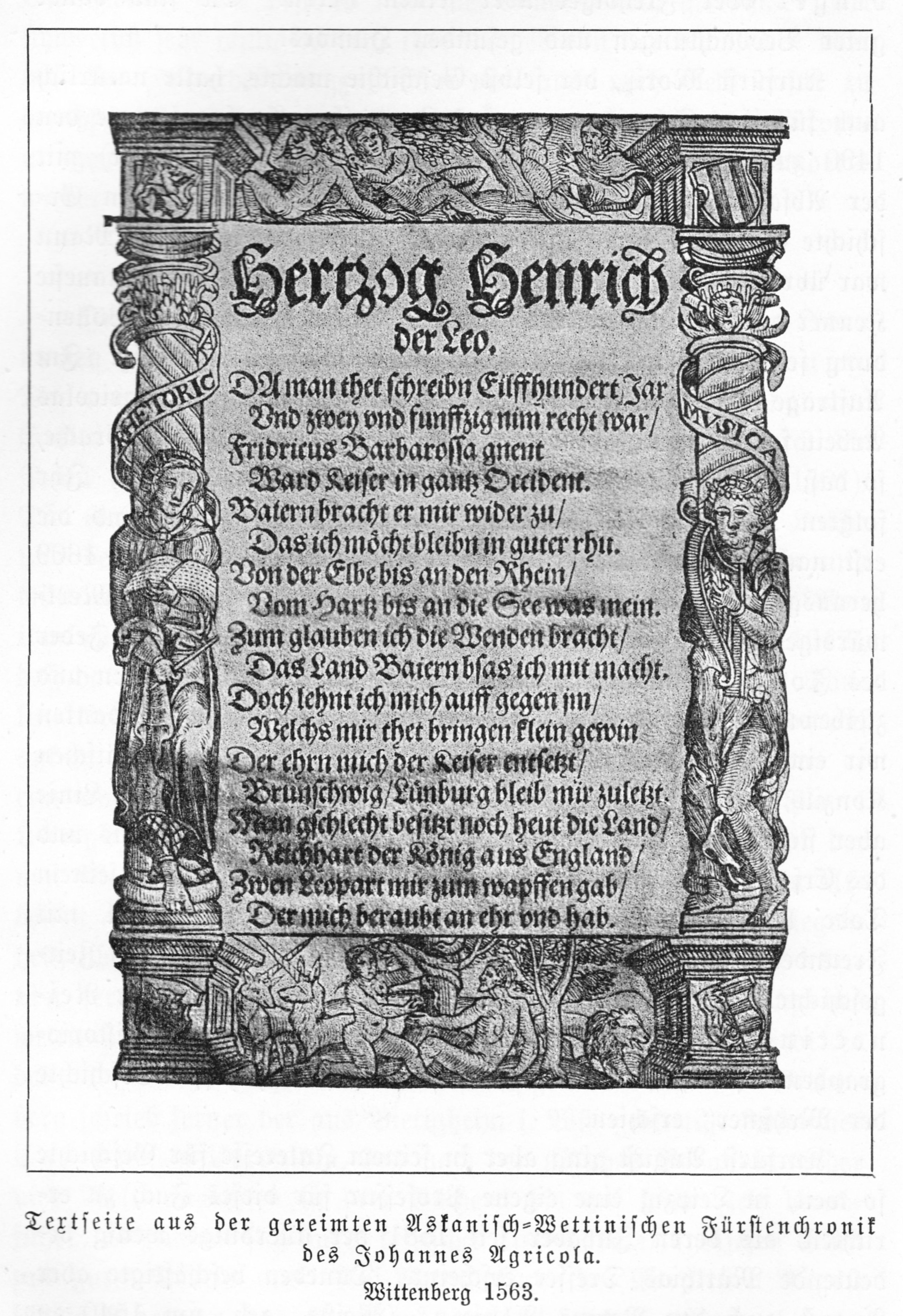 Textseite aus der gereimten Askanisch-Wettinischen Fürstenchronik des Johannes Agricola. Wittenberg 1563. Digitalisat des kompletten Werkes